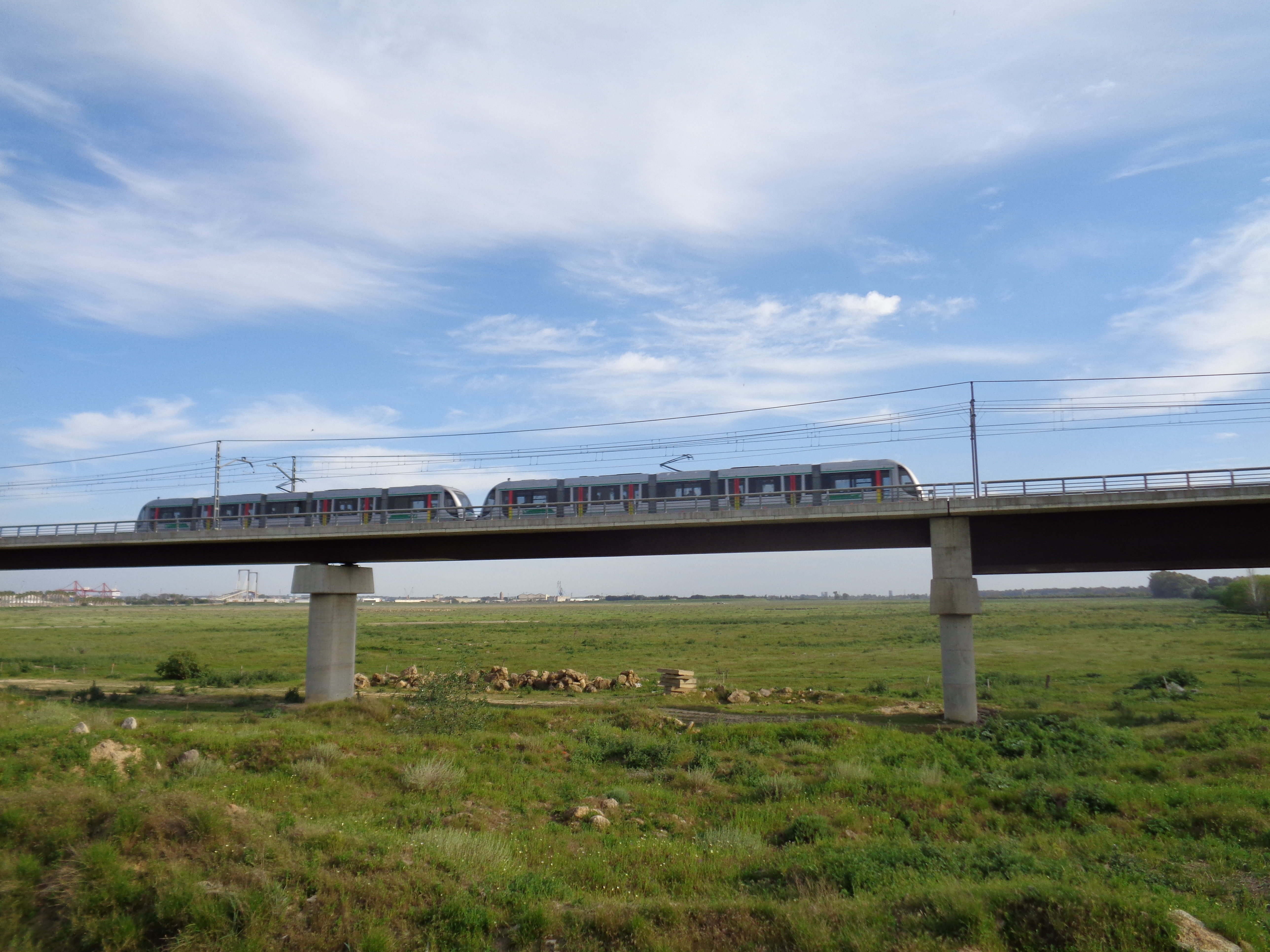 Tren doble del metro de Sevilla pasando por la dehesa de Tablada